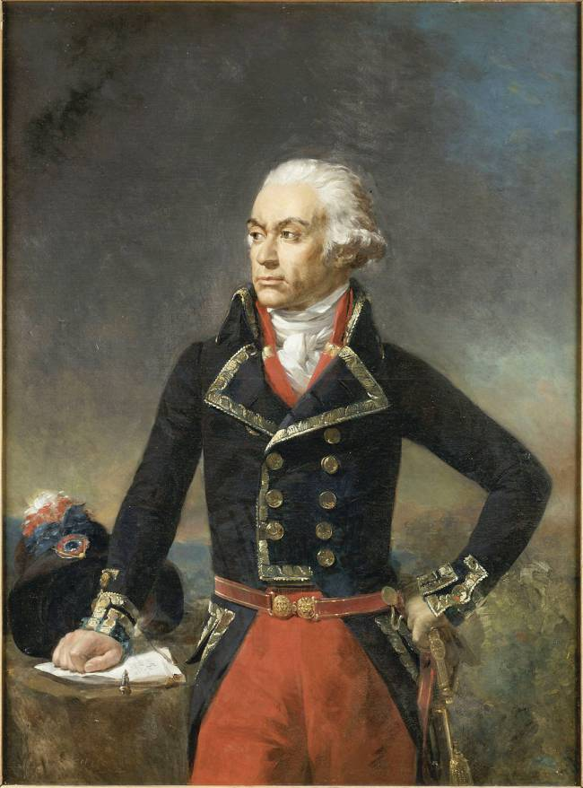 posthumous portrait, Paris 1834